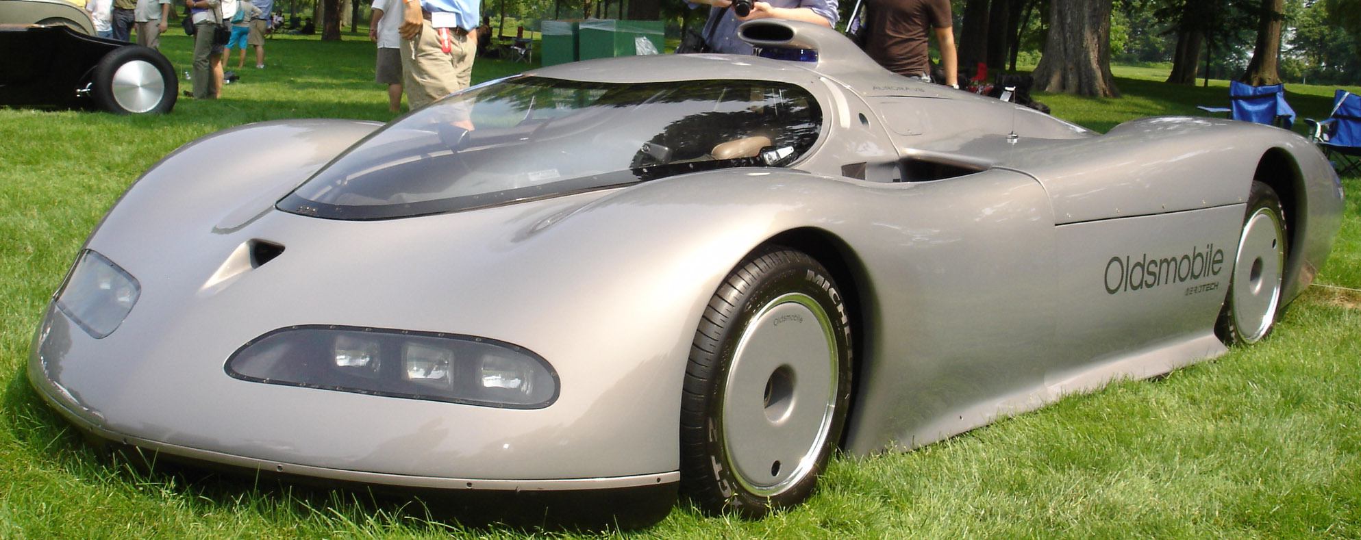 Oldmobile Aerotech